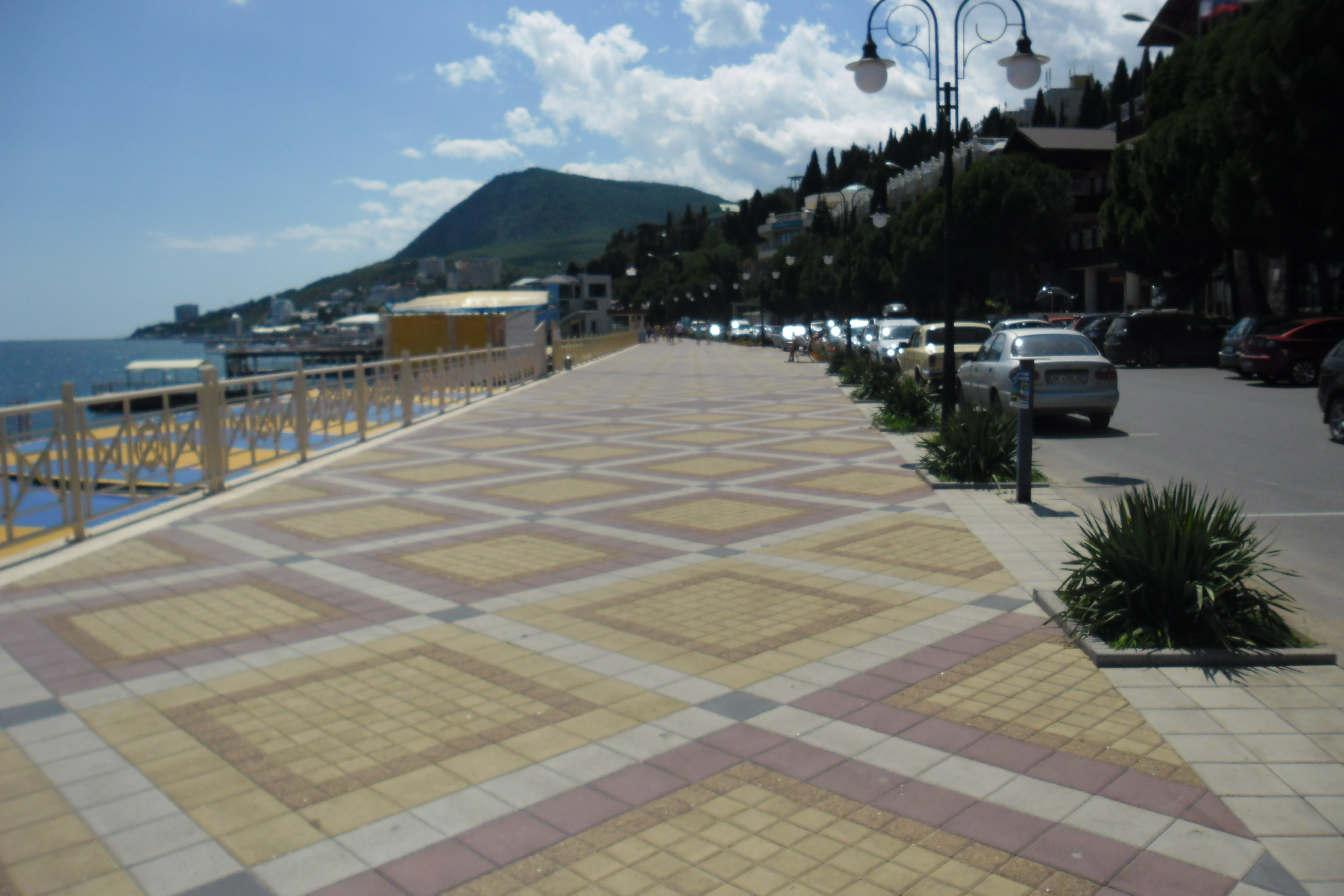 Фото